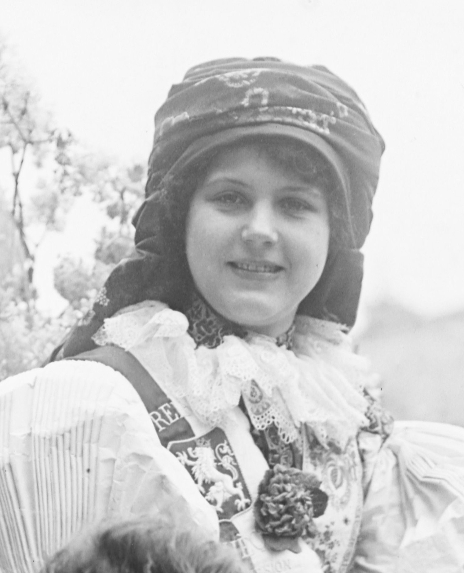 Ruzena Brazova Reine de Prague à la Mi-Carême 1910 à Paris.